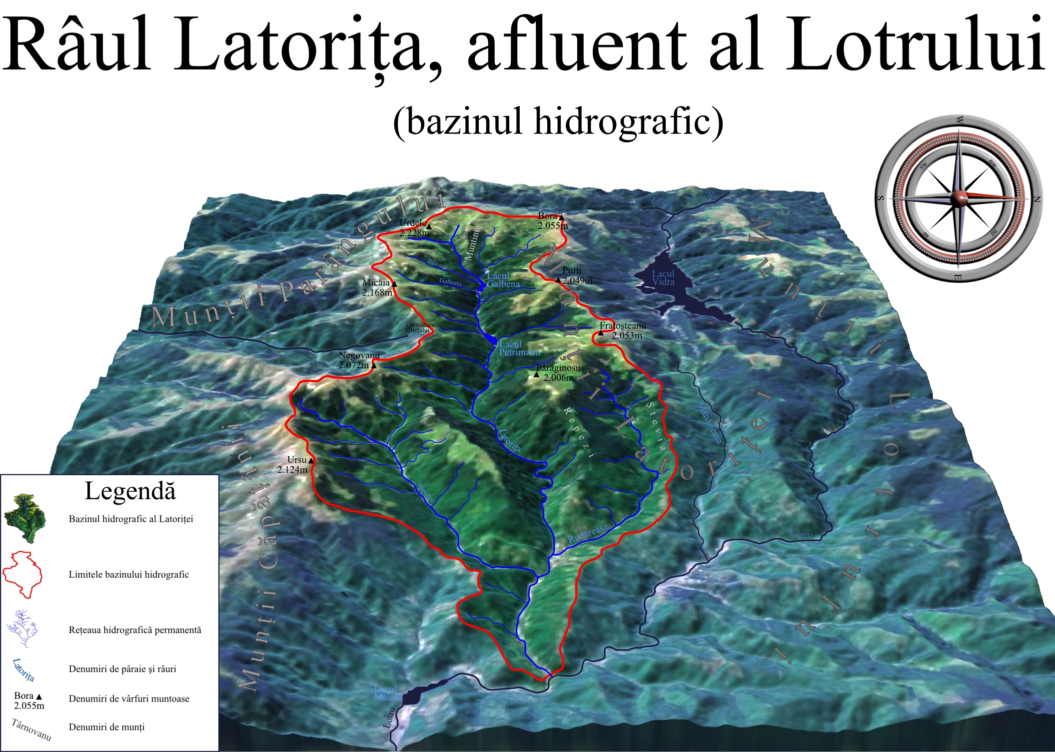 Bazinul hidrografic al Râului Latorița, Romania. Selectați alte bazine hidrografice adiacente ale Defileului Oltului, menționate pe hartă în mod senzitiv cu chenare de note informative.